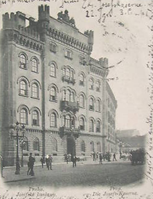 Josefská kasárna v Praze na Josefském náměstí (dnes náměstí Republiky) na Novém Městě